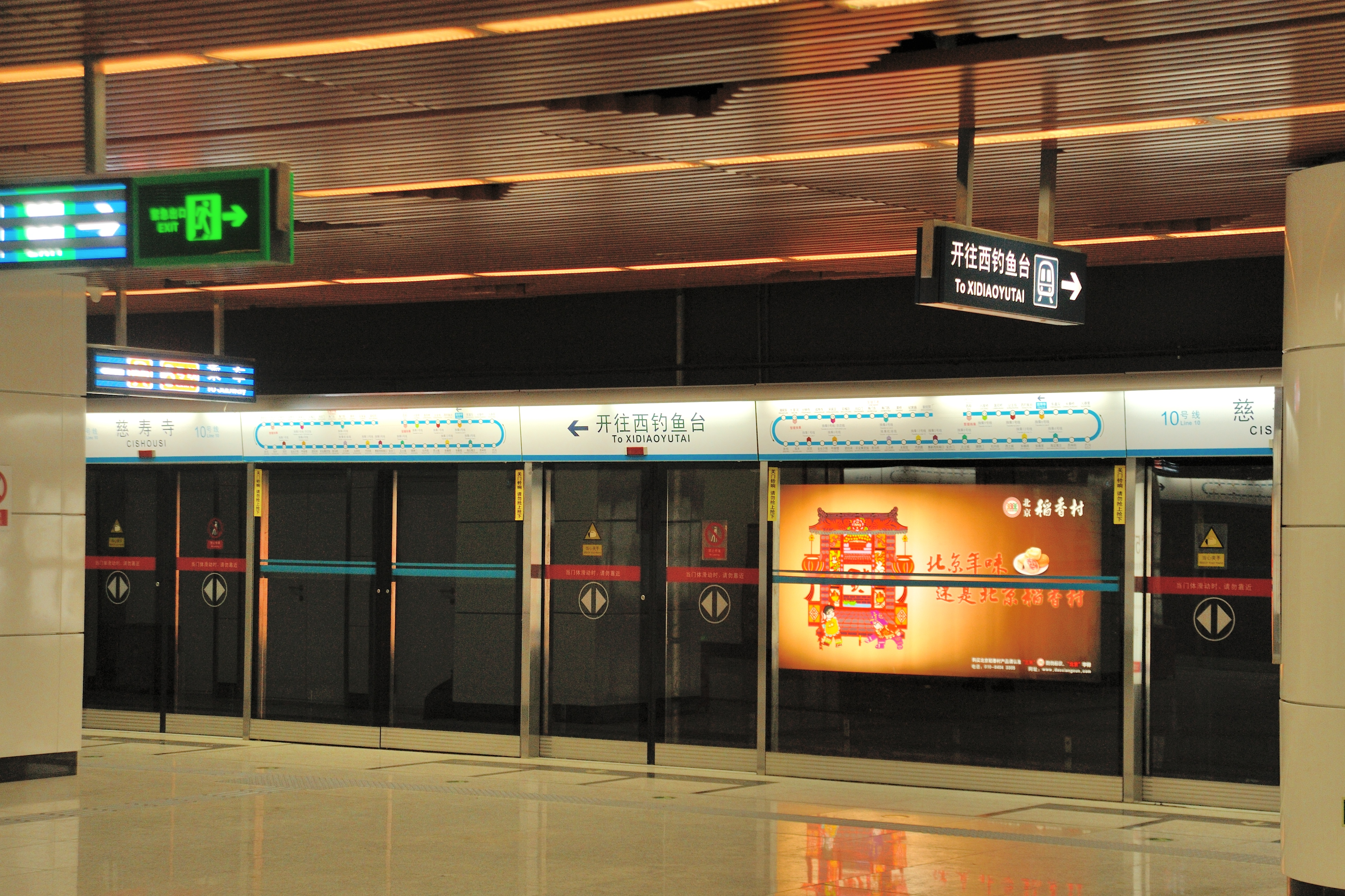 慈寿寺站10号线站台